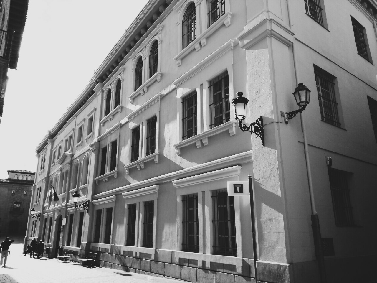 Biblioteca de La Rioja desde la calle Mayor